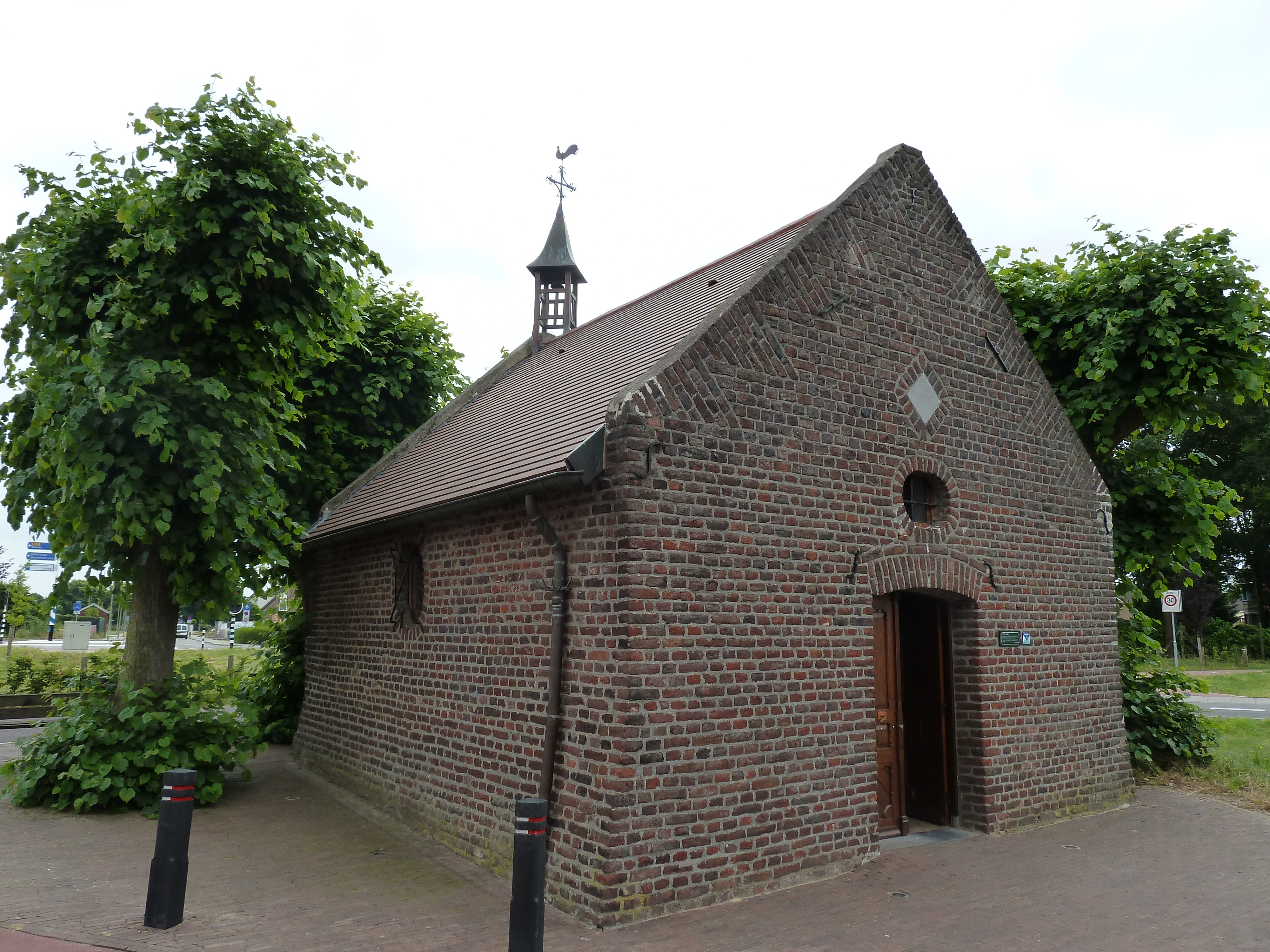 Heierkapel, Swalmen, Nederland